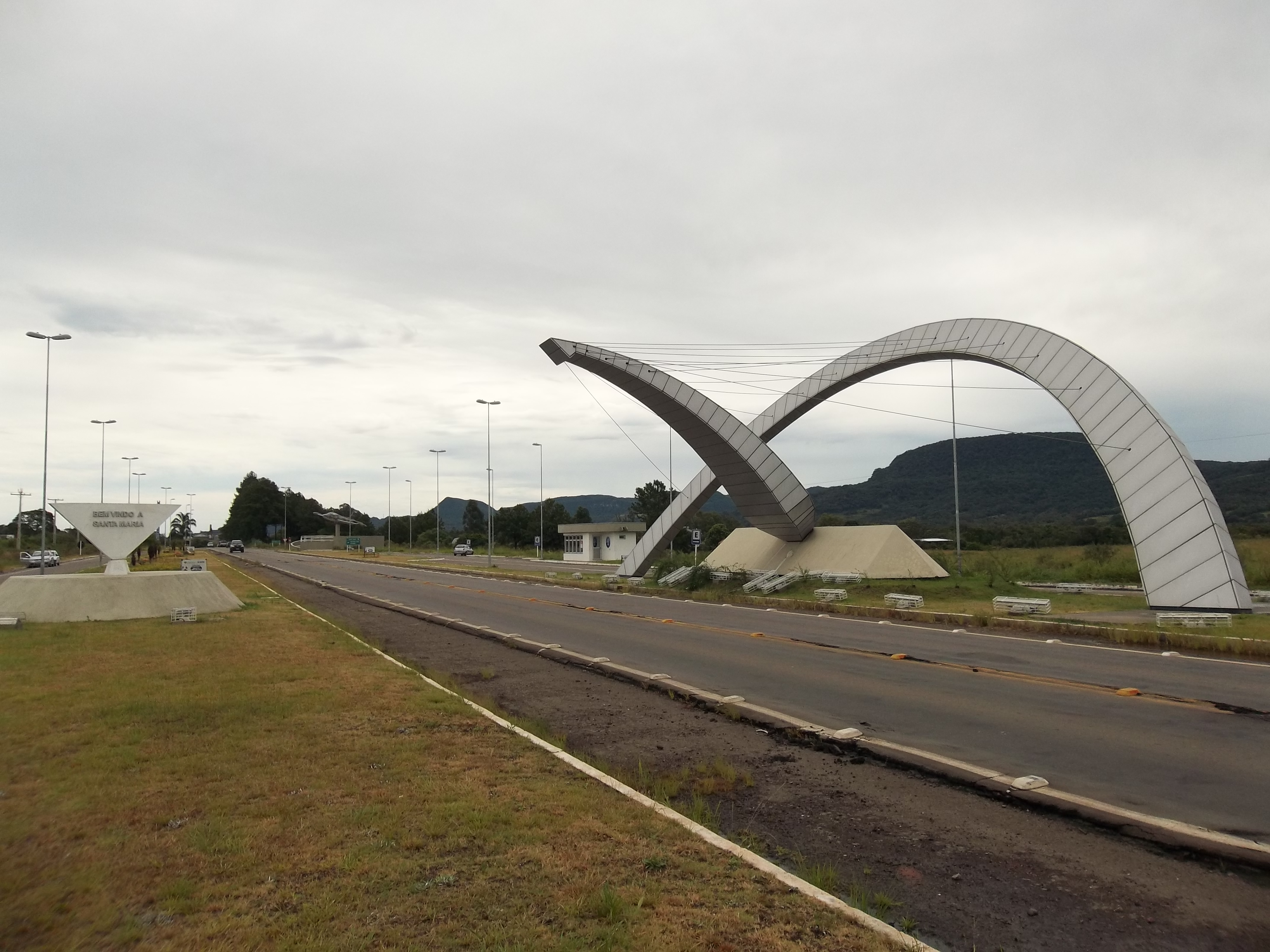 Pórtico da Base Aérea de Santa Maria. Camobi, Santa Maria, Rio Grande do Sul, Brasil